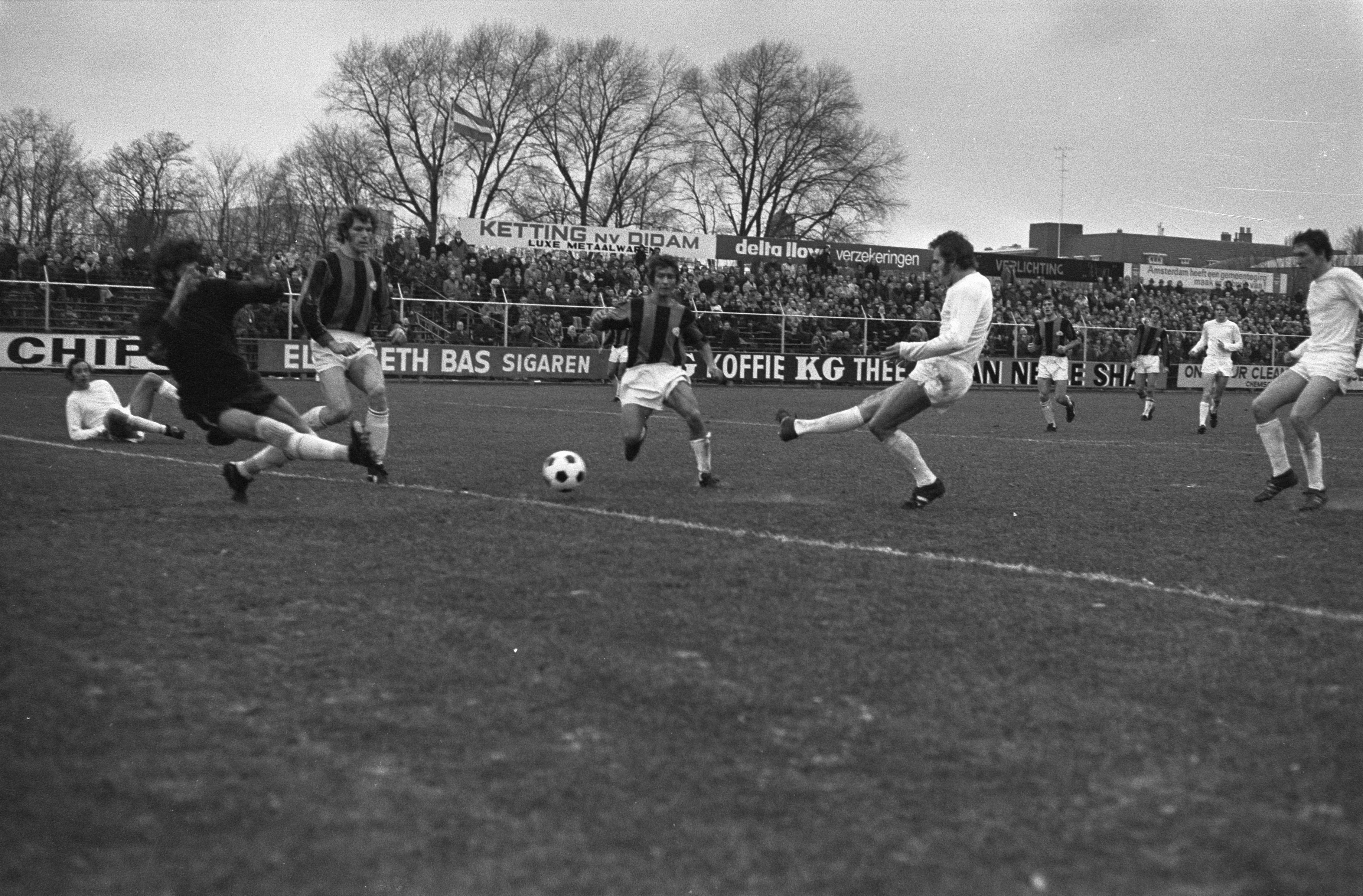 Match de football DWS - NEC (2-3), Cas Janssens marque un but. Photographie par Punt / Anefo.